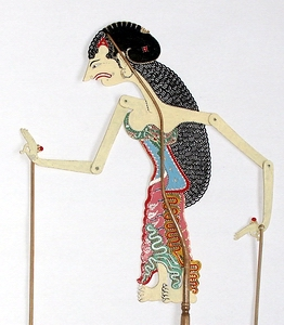 Munigarim